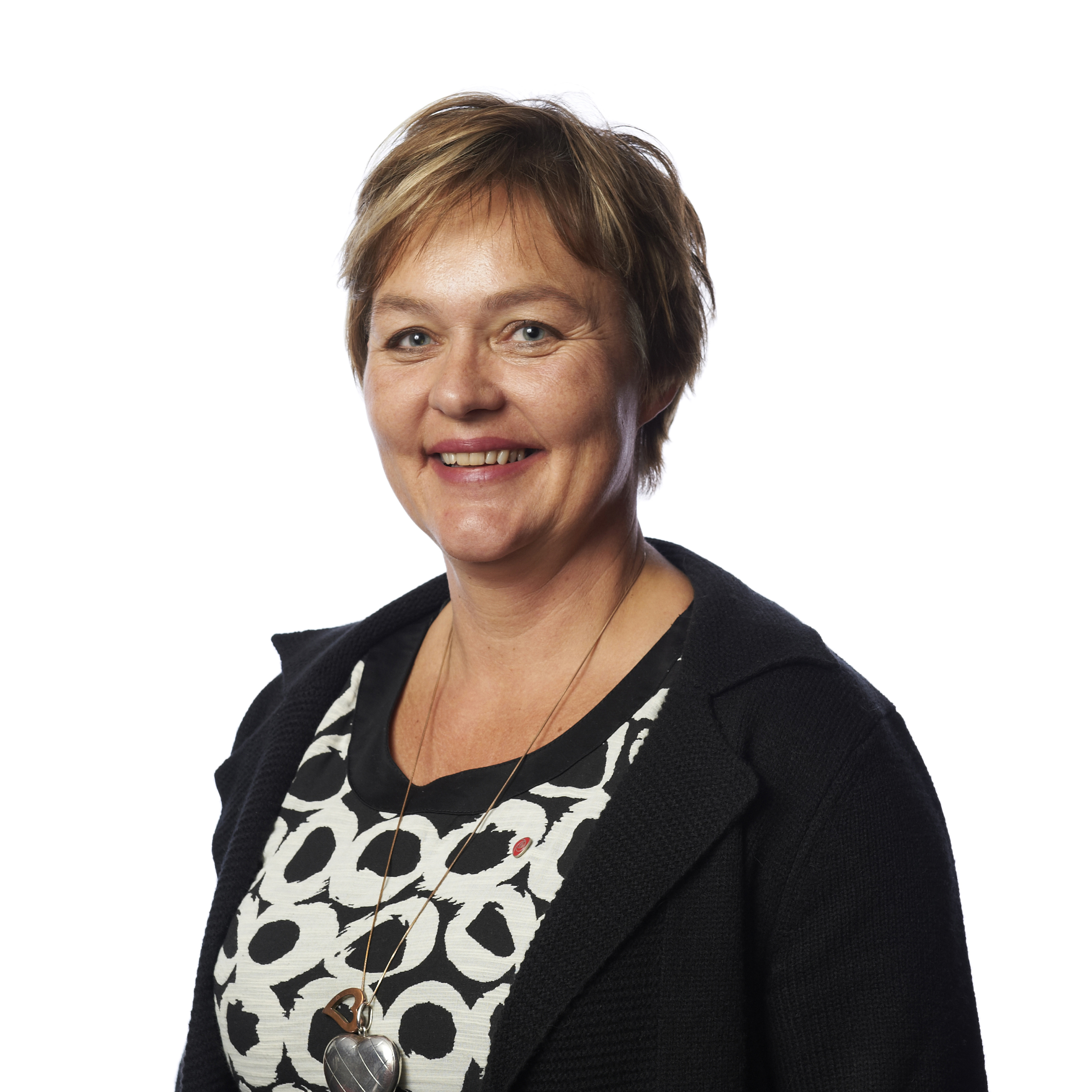 Siri Klokkerstuen, Arbeiderpartiet , kultur- og ressursutvalet